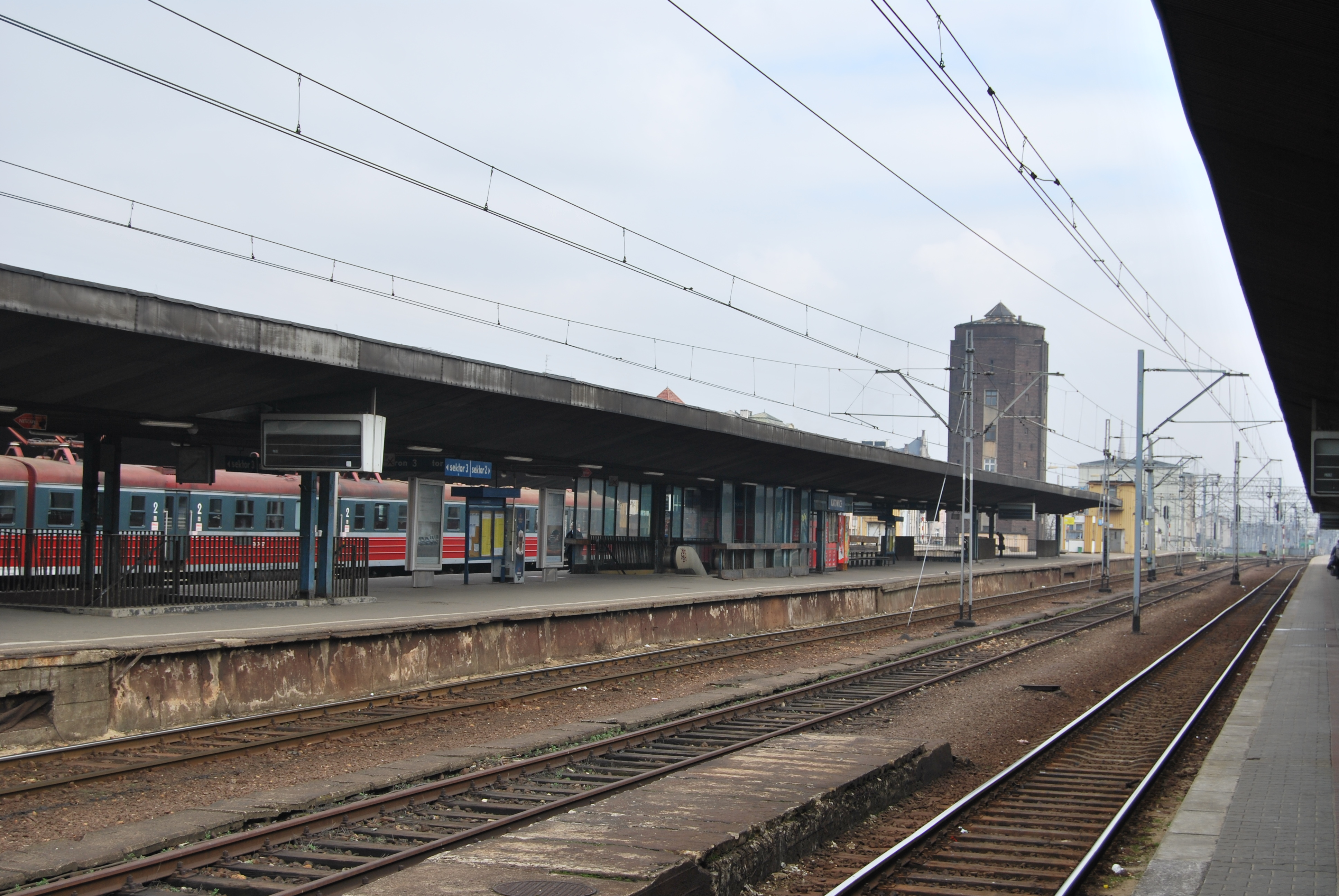 Železniční stanice Katowice - pohled na nástupiště, Polsko